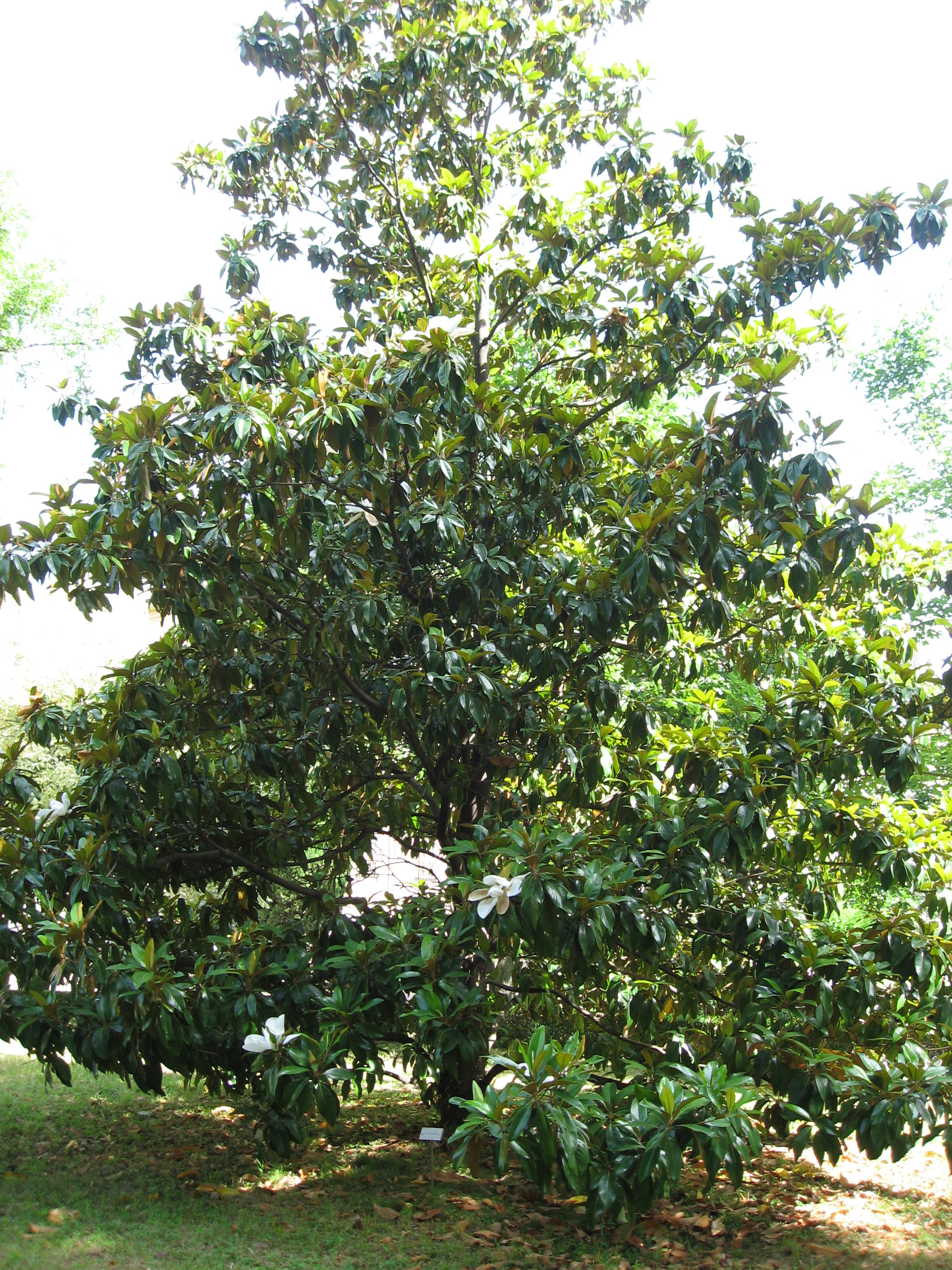 Magnolia grandiflora in Giardino dei Semplici di Firenze Map: 43° 46' 45" N 11° 15' 39" E